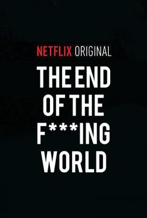 The End of the F***ing World logo netflix